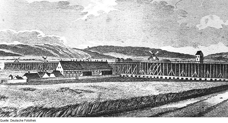 Original image description from the Deutsche Fotothek Artern/Unstrut. Saline mit Gradierwerk und drei Windmühlen, 1829, aus: Arterner Heimatbuch, 1913